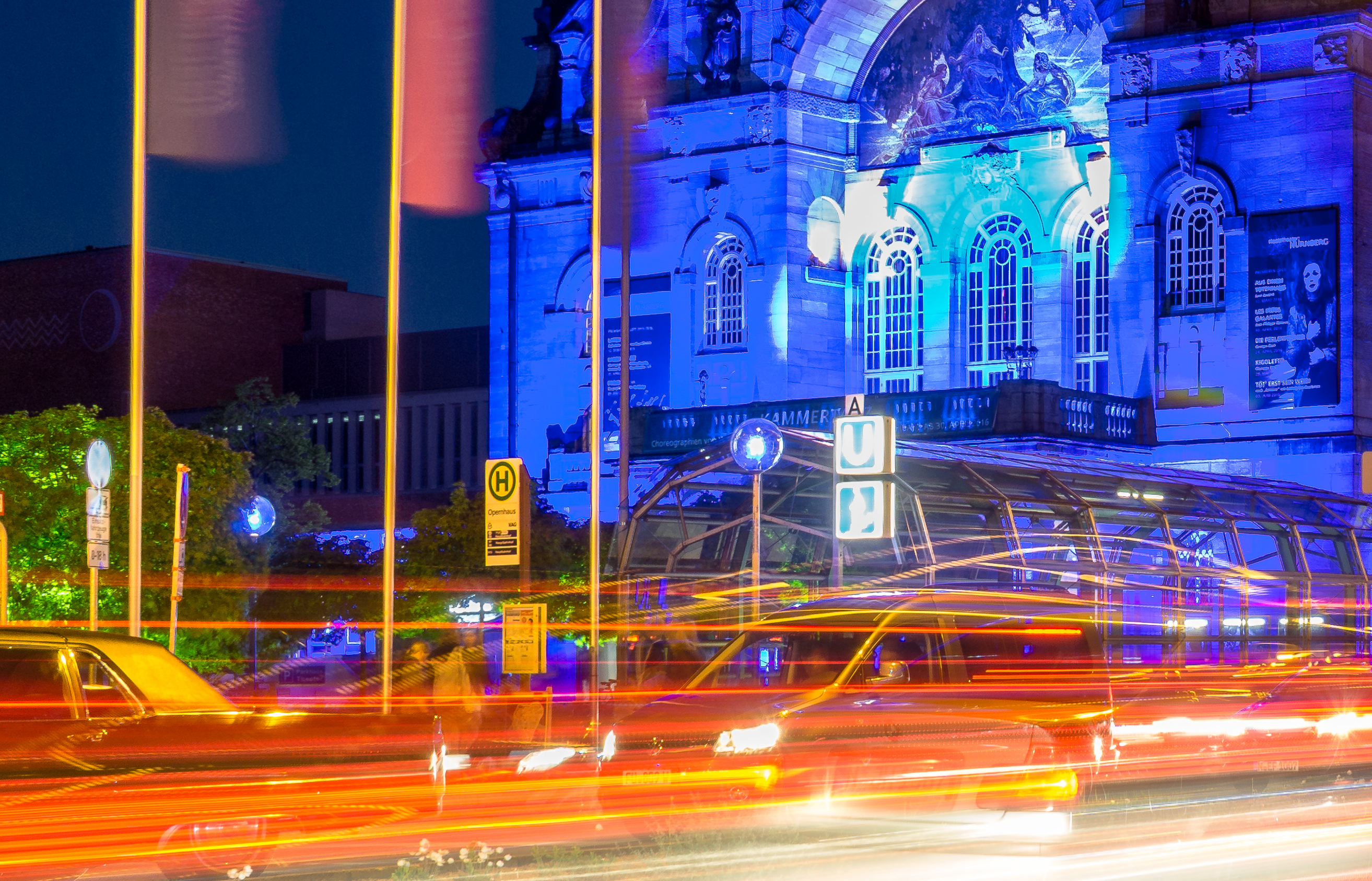 Nightliner-Haltestelle und U-Bahnabgang vor dem Opernhaus Nürnberg an der Blauen Nacht 2016